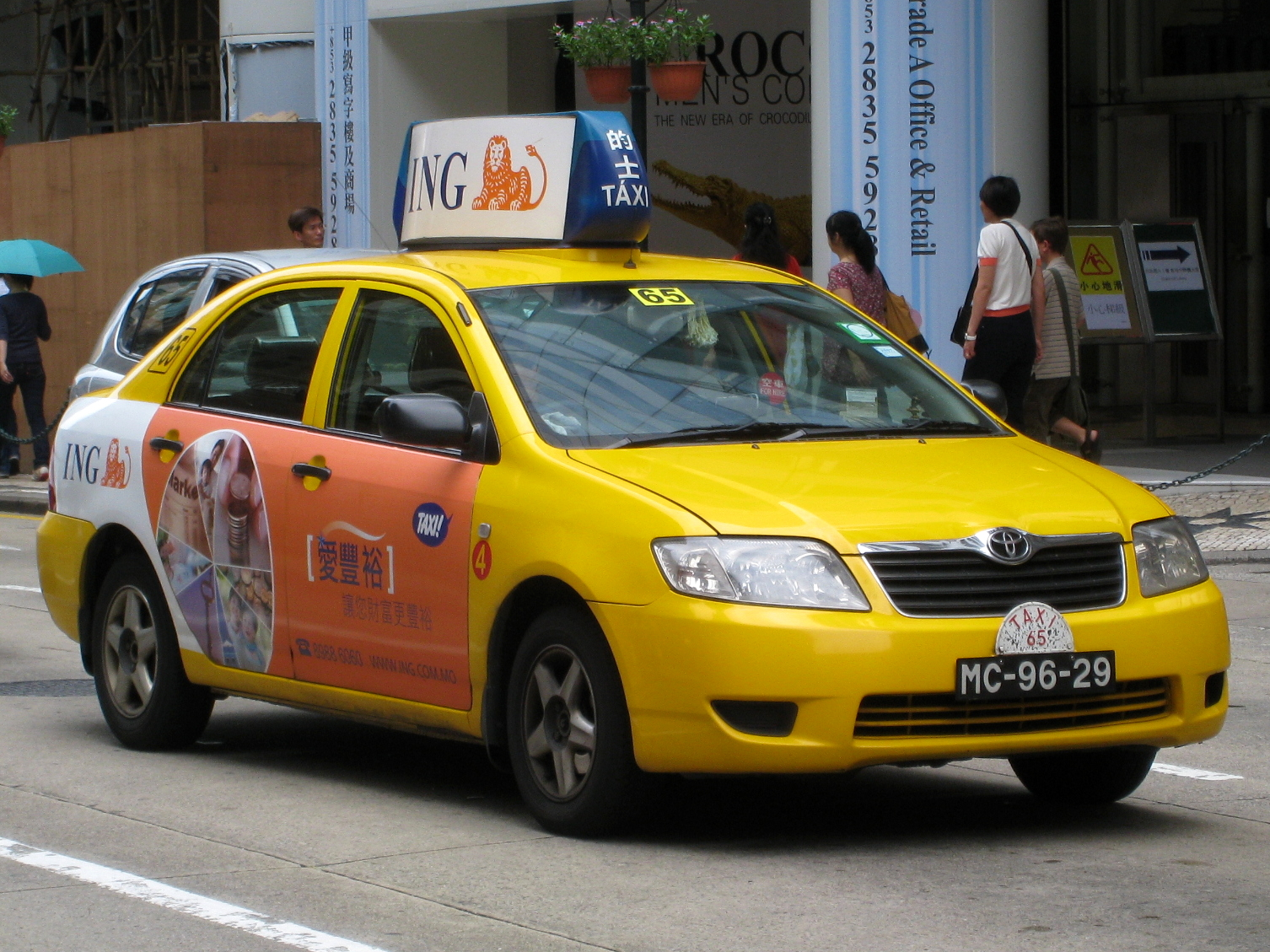 Macau Yellow Taxi 澳門的士